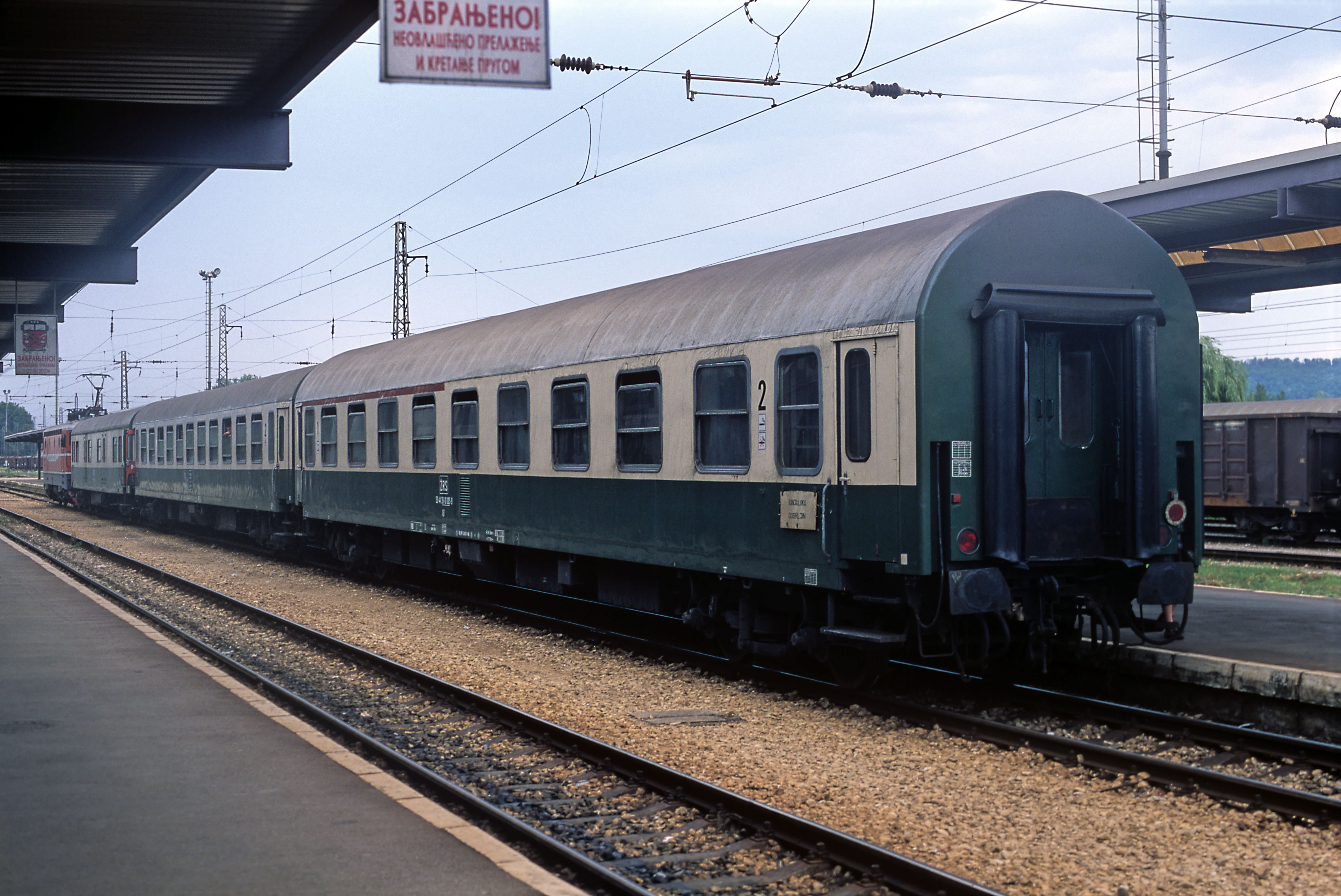 gemischtklassiger Reisezugwagen Typ Y/B70 im äußerlich unveränderten DR-Anstrich chromoxidgrün-elfenbein, als Aufbauhilfe nach den Balkankriegen nach Bosnien abgegeben und bei der Željeznice Republike Srpske eingestellt. Der Wagen läuft auf Drehgestellen der Bauart Görlitz VI mit Klotzbremse, die Einstiege sind noch nicht mit der vierten Trittstufe ausgerüstet. Typisch für die Wagen der Bauart Y/B70 sind die massiven Übergangstüren ohne Öffnungshilfe, deren Flügel nicht gekuppelt sind, aber federbelastet geschlossen gehalten werden, das Lüftergitter auf der Gangseite in Wagenmitte und die wegen Kunststoffzwischenlagen nicht vorhandenen Schmiergefäße für die Gleitstücke zwischen Wiege und Wagenkasten. Im Wagenübergang ist das UIC-Kabel erkennbar. Die Dachform ist wegen der unterflur eingebauten Luftheizung nicht mehr notwendig, sie wurde für ein einheitliches Bild der Züge beibehalten.